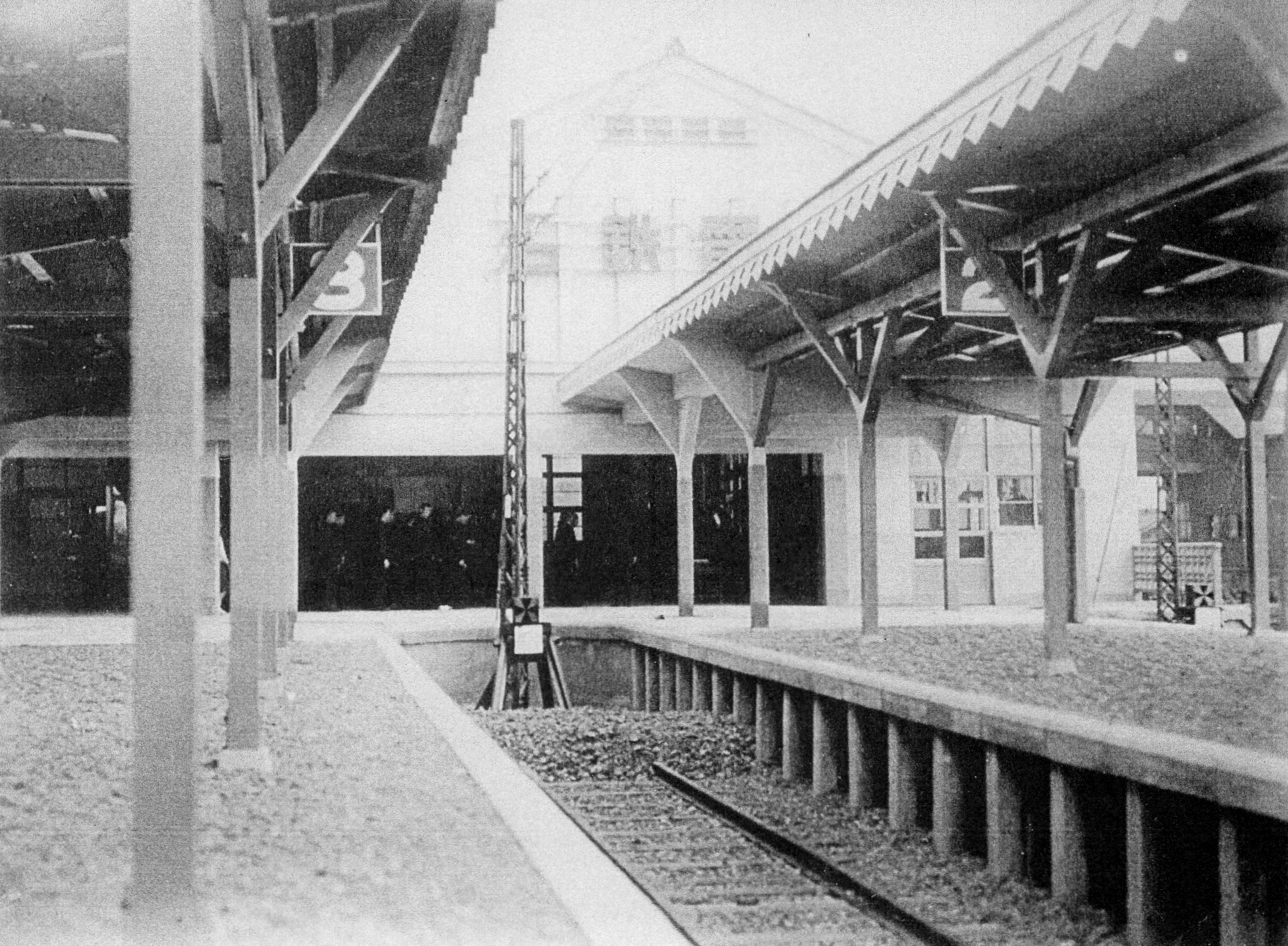 神宮前―伝馬町間の複線開通（昭和17年）